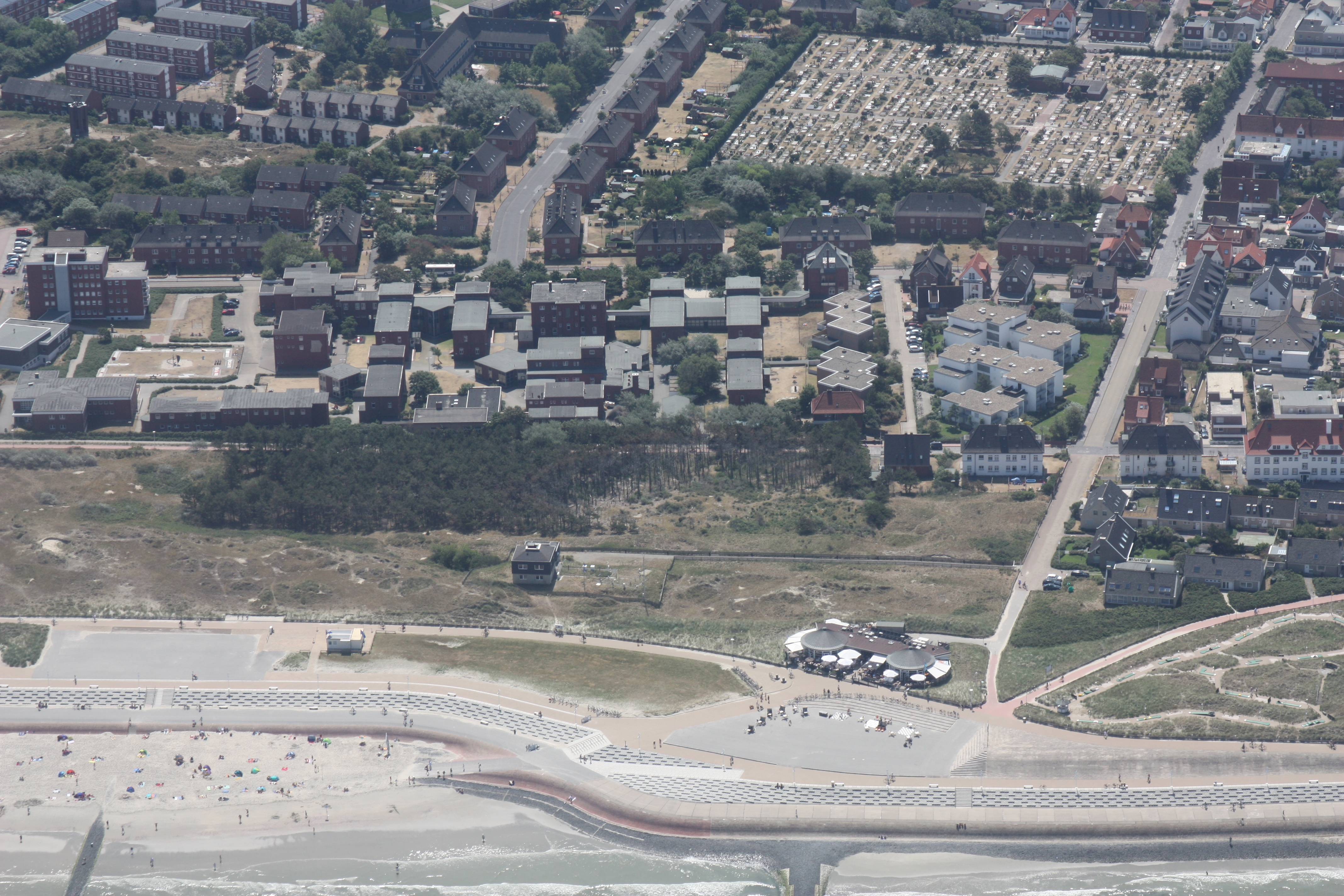 Flug über Norderney – von Westen kommend, am Nordstrand entlang; Flughöhe 500 m = 1500 ft; Juli 2010